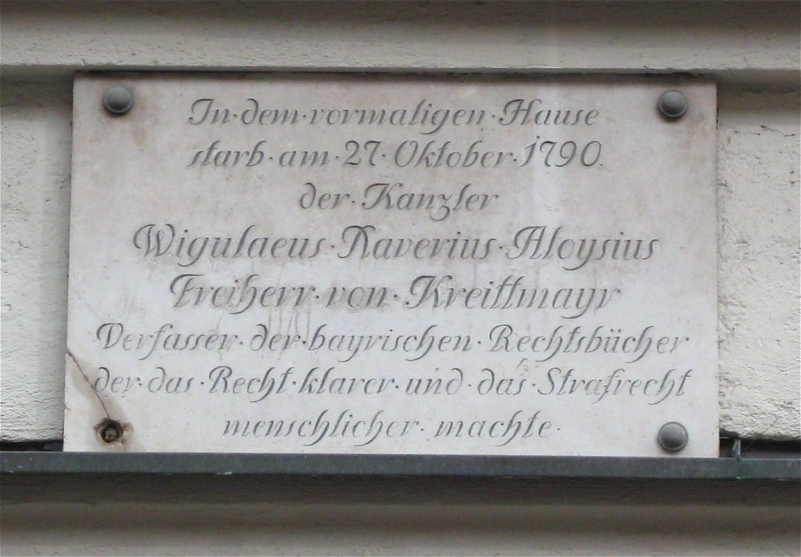 Burgstraße 6; Wohn- und Geschäftshaus, neubarock, 1909/10 von Karl Stöhr (mit Rückgebäude Sparkassenstraße 11, siehe dort); Gedenktafel für Wiguläus Freiherr von Kreittmayr, der 1790 im Vorgängerhaus starb.